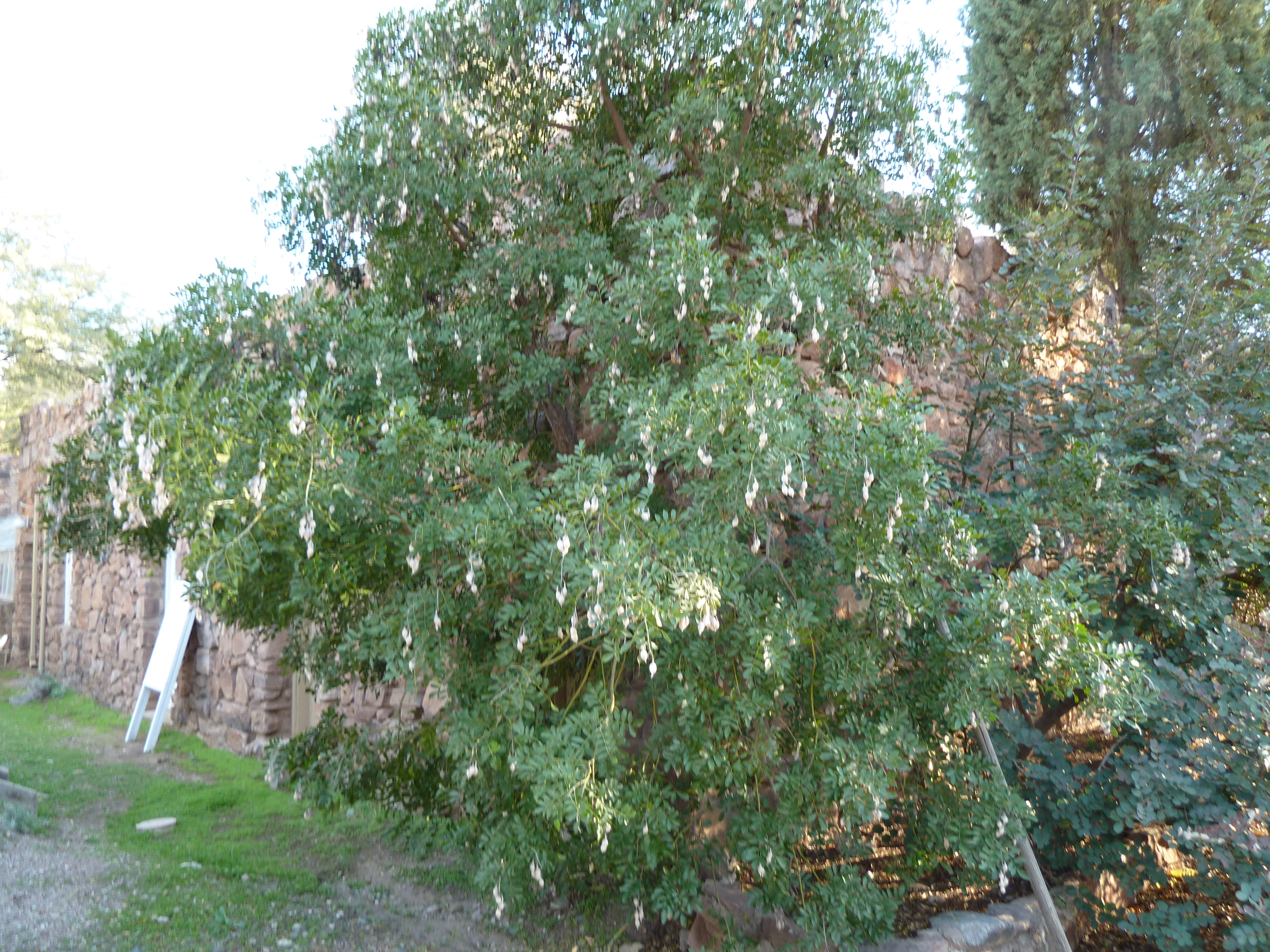 Detalle Sophora secundiflora